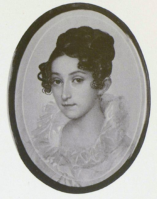 Екатерина Фёдоровна Кривцова (1798/1801-1861), дочь Ф.Ф.Вадковского и графини Е.И.Чернышёвой, была замужем за Николаем Ивановичем Кривцовым (1791-1843).